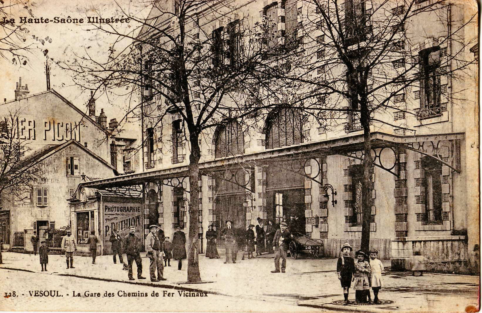 Carte postale ancienne éditée par Reuchet-Ougier, imprimeur à Feugerolles, n°128 : La Haute-Soône illustrée - VESOUL - La Gare des Chemins de fer vicinaux